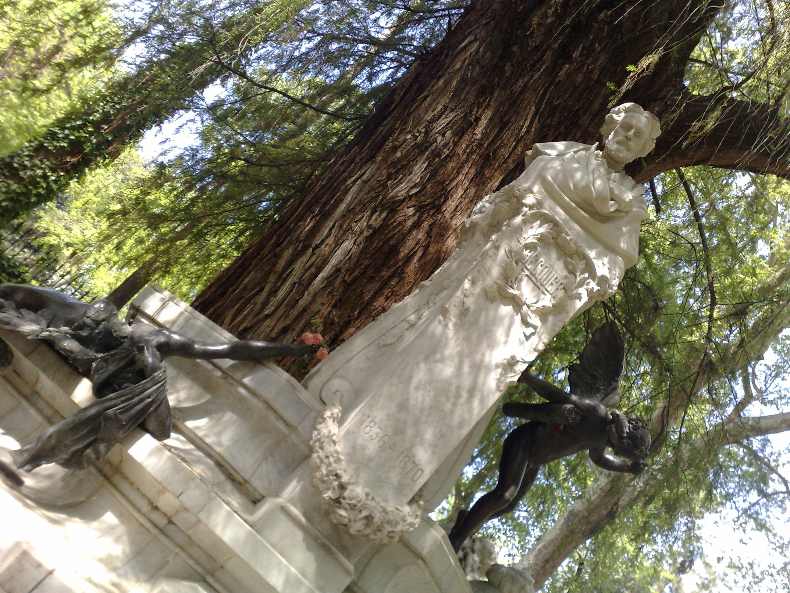 Monumento a Gustavo Adolfo Bécquer en el Parque María Luisa de Sevilla. Vista frontal.